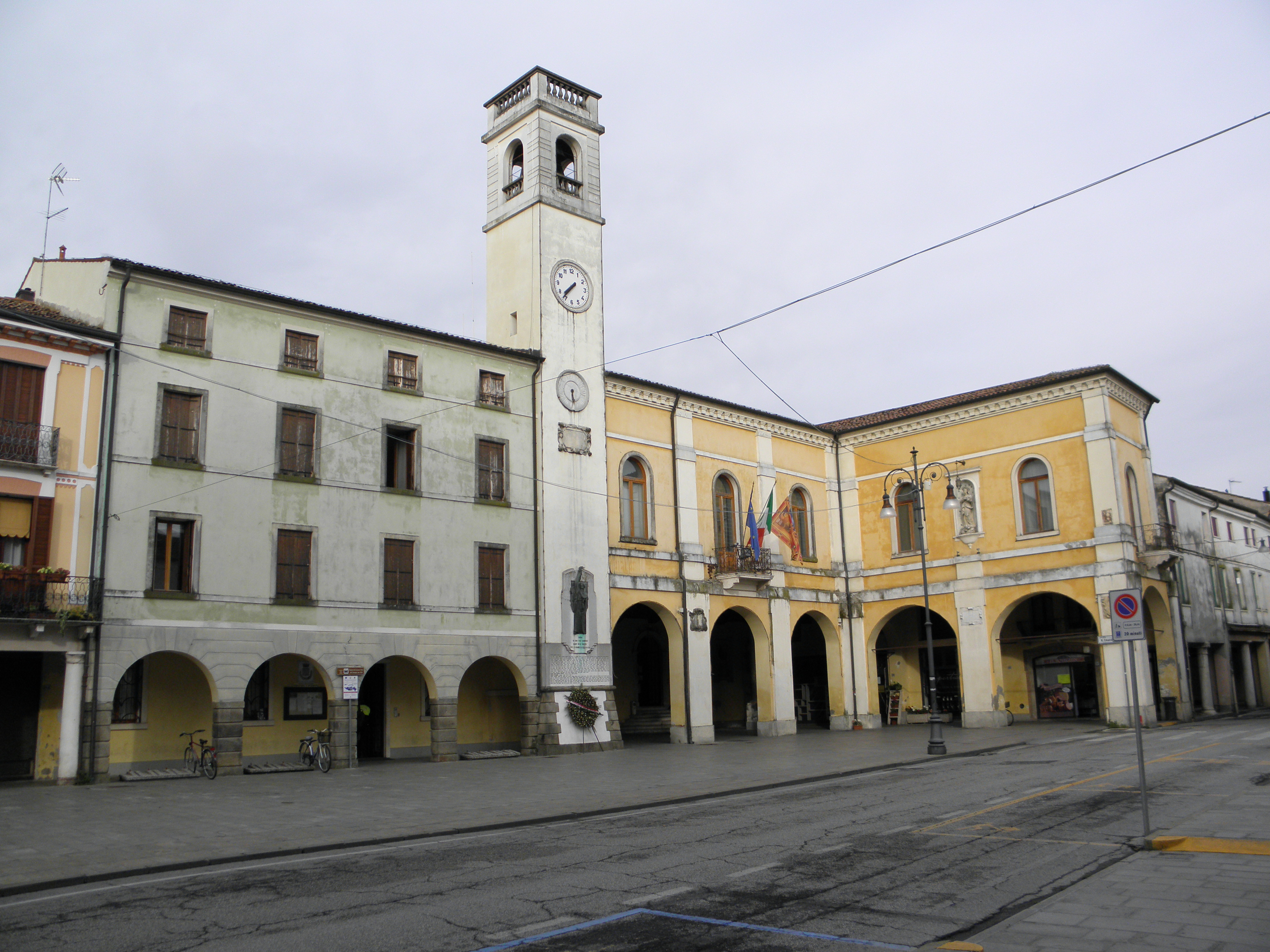 Badia Polesine, Piazza Vittorio Emanuele II: il Palazzo del Comune e la Torre Civica.